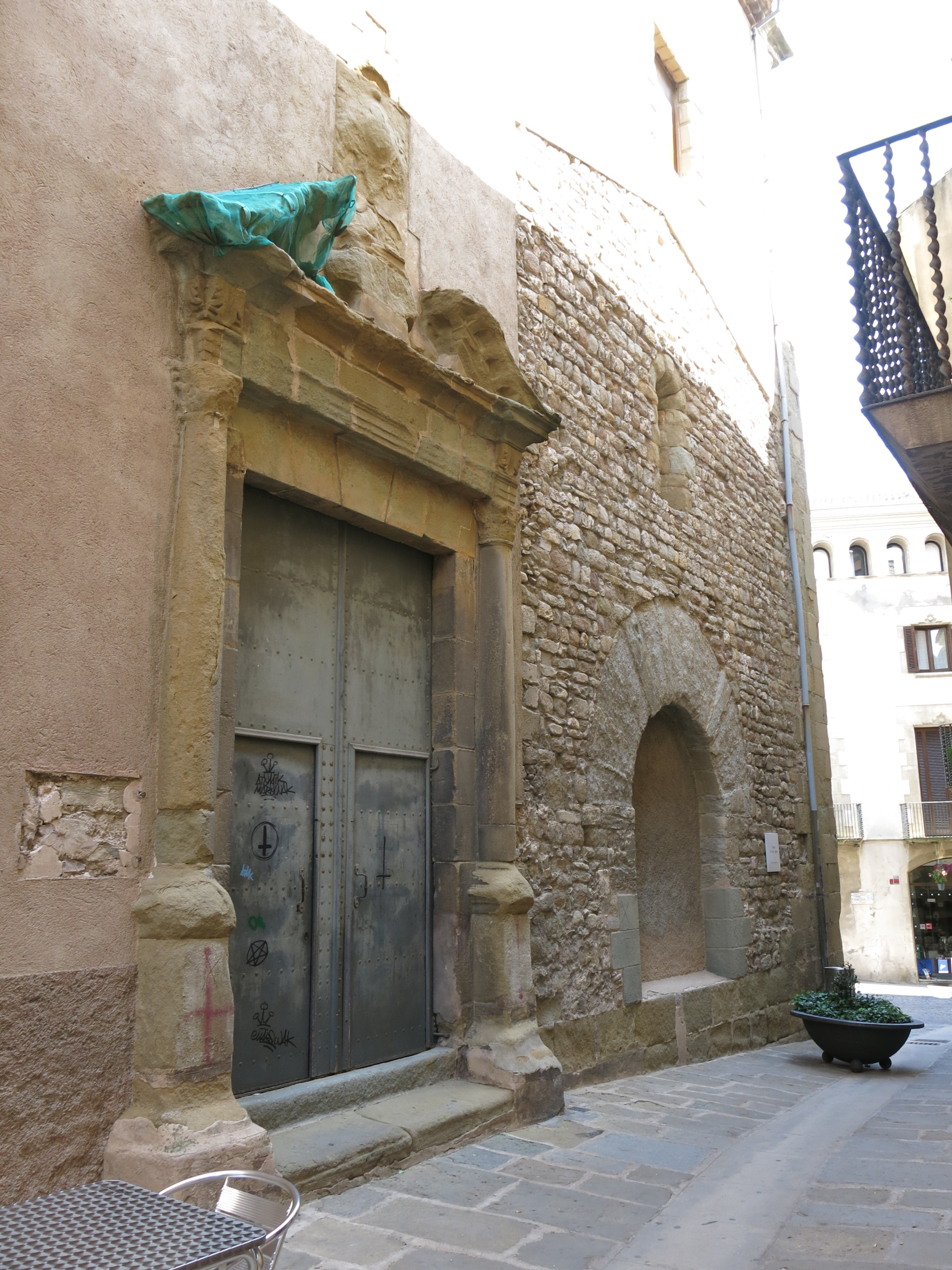 Mur al carrer Sant Sadurní (Vic)